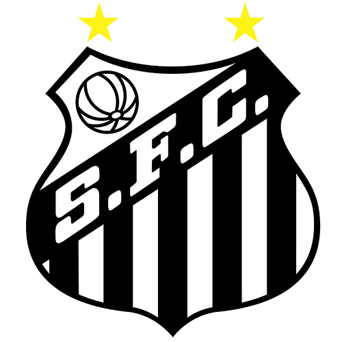 Escudo do Santos Futebol Clube, Santos (SP), Brasil.